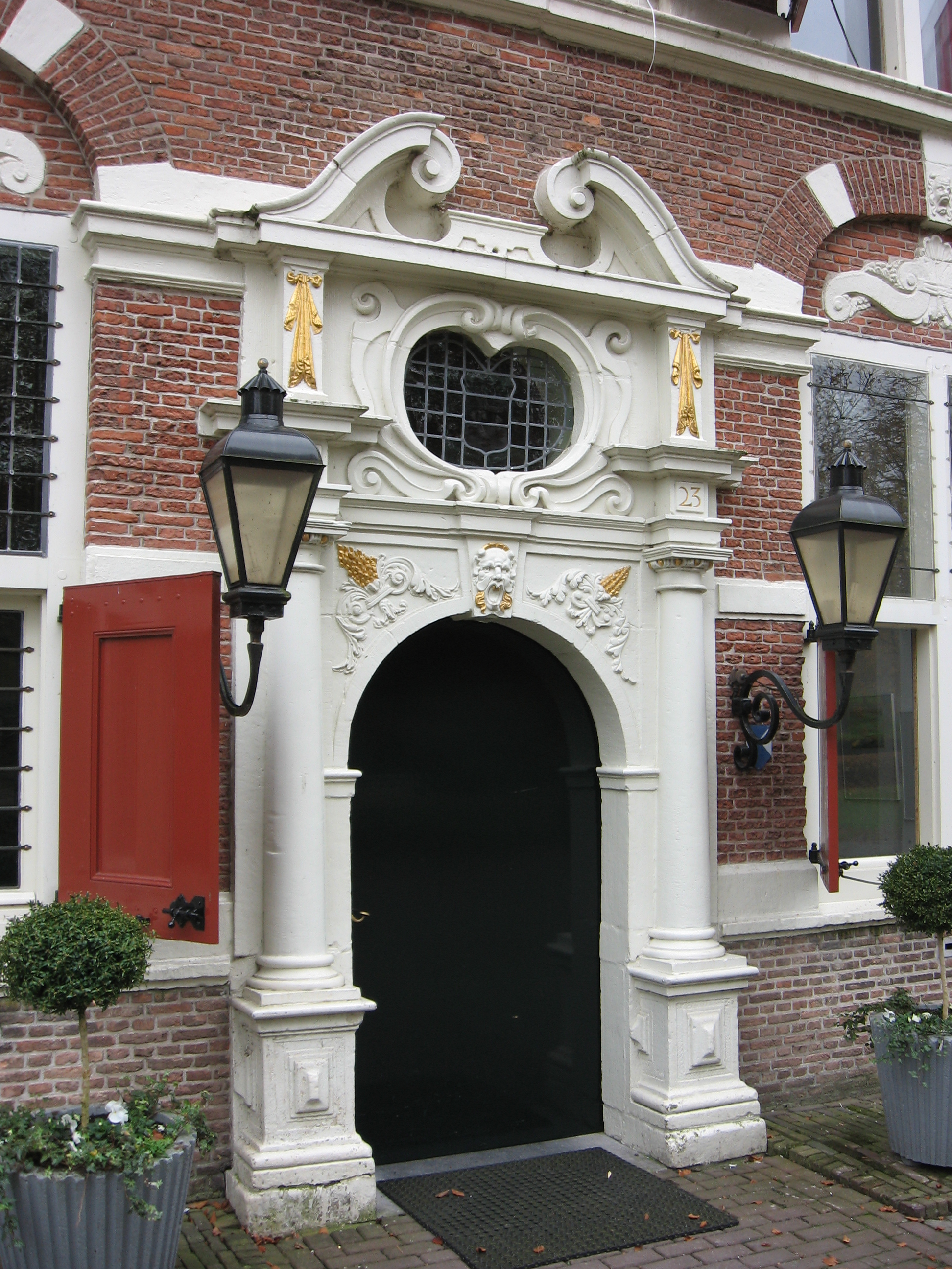 Zicht op de ingang van het Mauritshuis in Willemstad